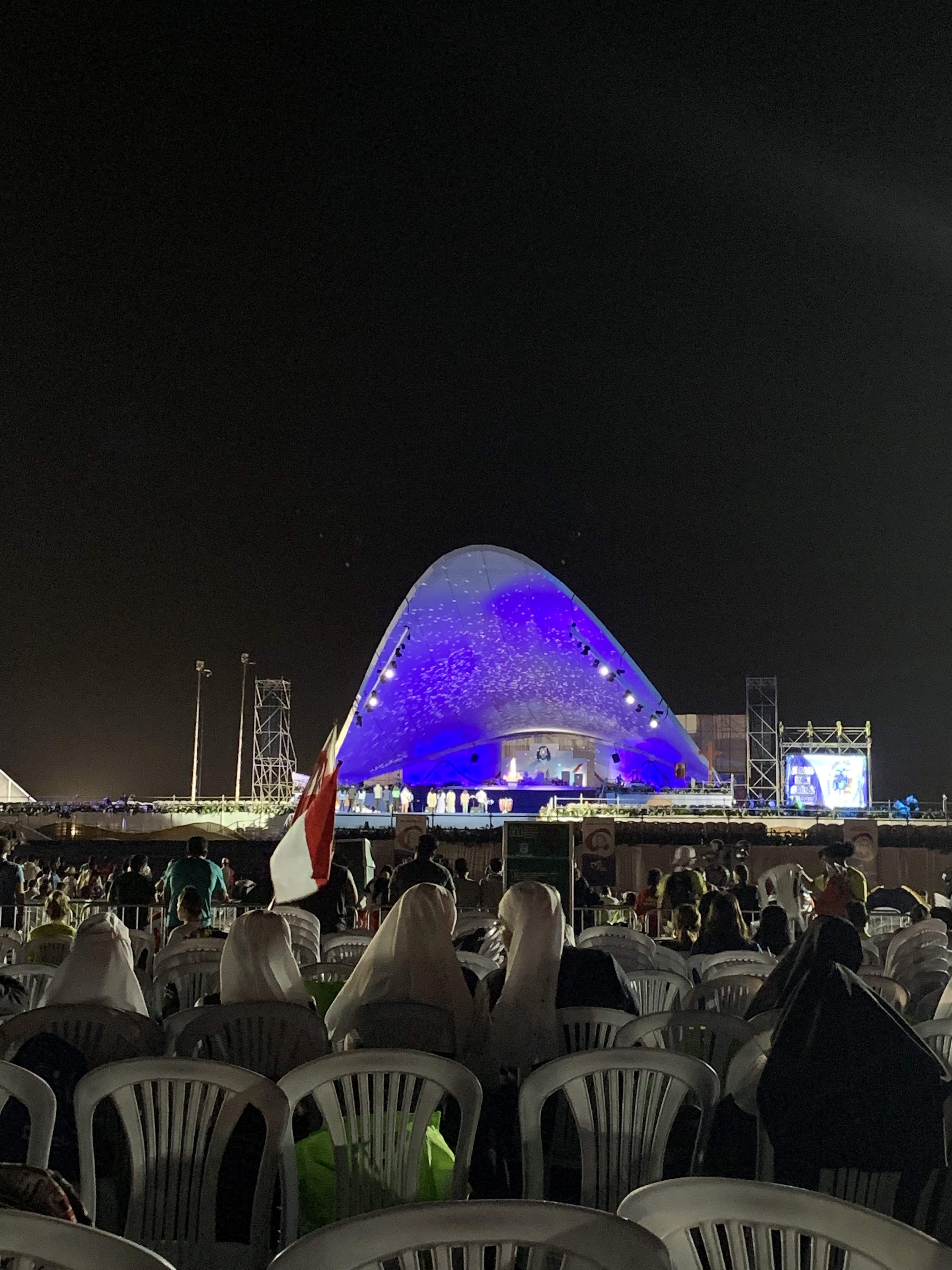 Escenario principal de la Vigilia de adoración la noche del sábado 25 de enero de 2019 en Metro Park, Panamá, como acto central de la Jornada Mundial de la Juventud Panamá 2019